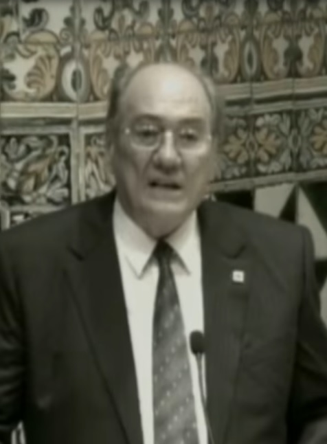 José María Murià